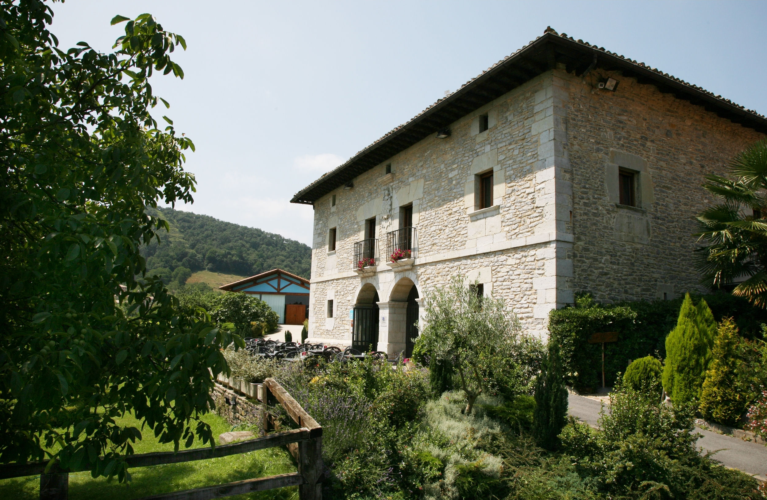 XVII. mendeko jauregia Kexaan.